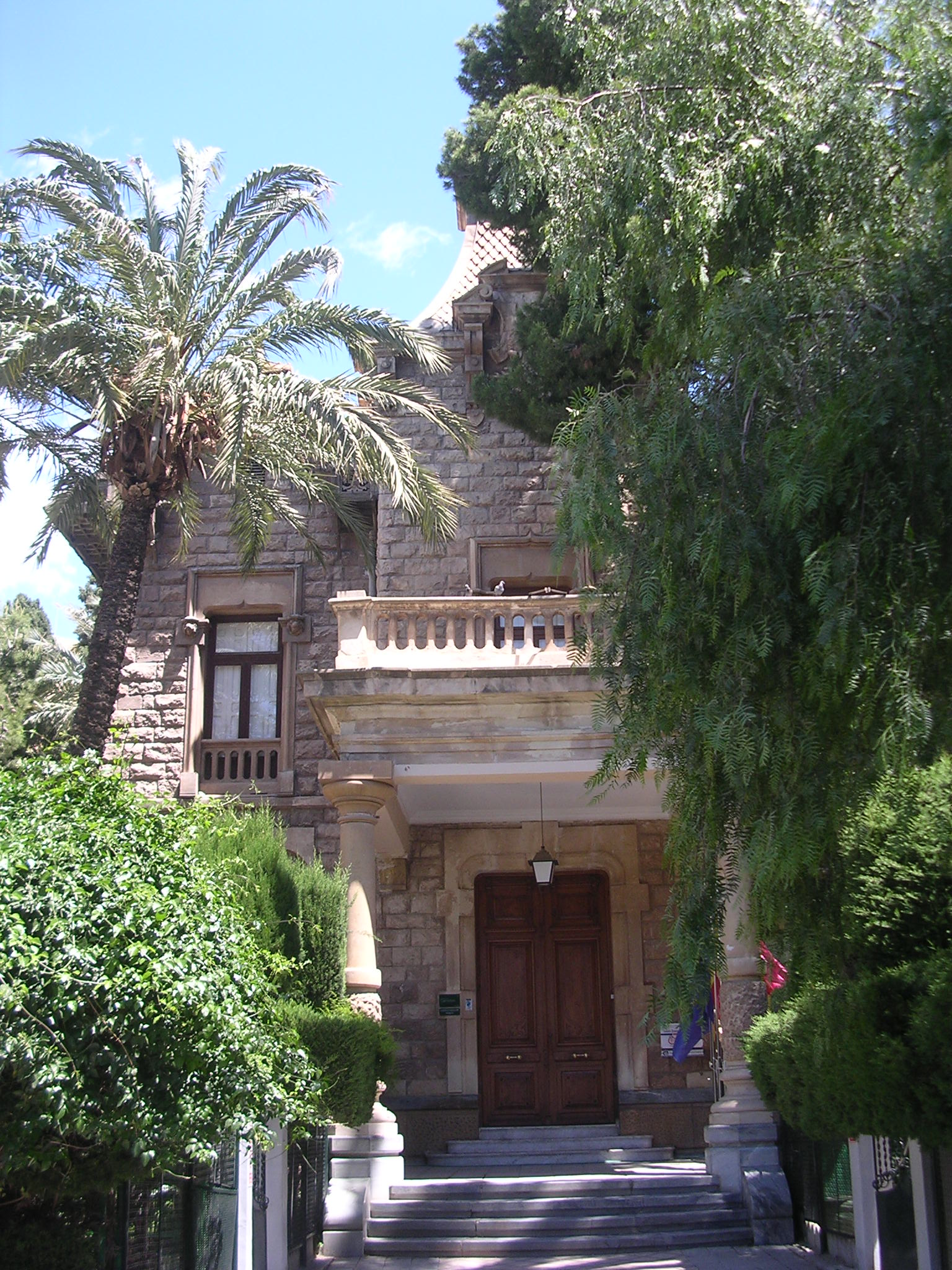 Edificio Modernista